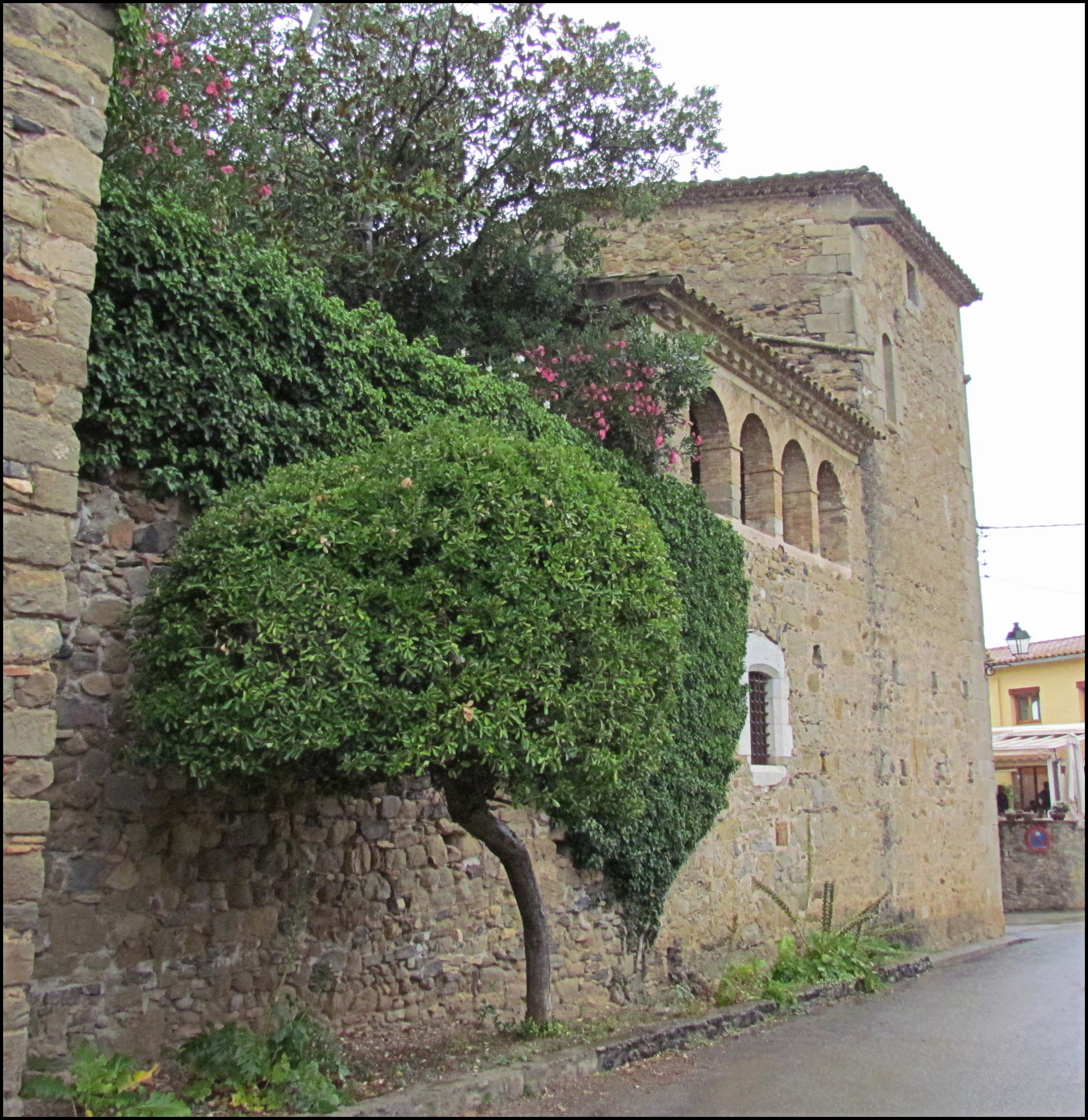 Maison-musée château Gala Dalí à Pubol